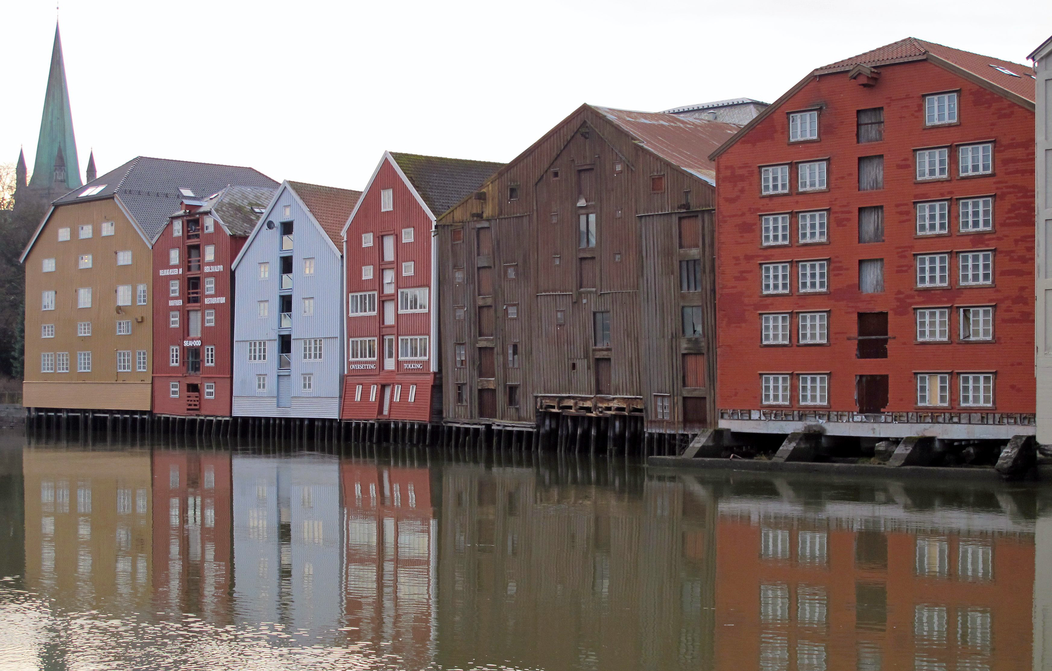 Bryggemiljø ved Nidelva i Trondheim. Kjøpmannsgata 5–15.